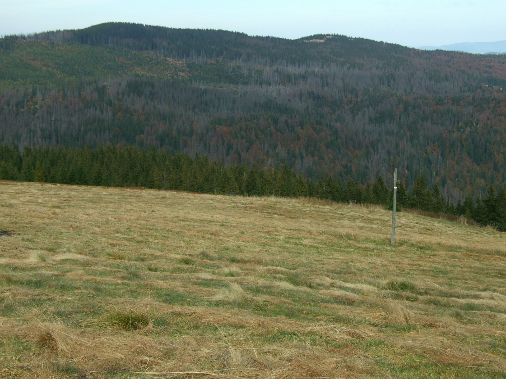 Kudłoń i Gorc Troszacki. Widok z polany Jaworzyna Kamienicka (Gorce)